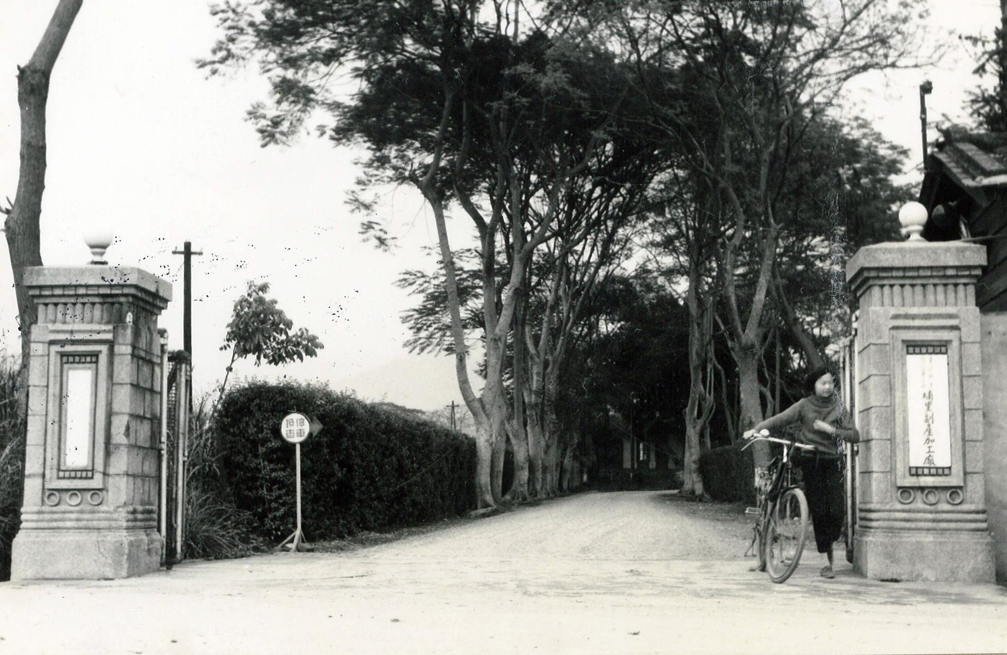 明治43年(1910年)日人藤澤靜象等人集資設立「埔里社製糖合資會社」，第二年復募股增資，擴大組織改稱為「埔里社製糖株式會社」，但是年因水災損失甚重，漸難支持，乃於大正2年(1913)7月併入「台灣製糖株式會社」稱為「埔里社製糖所」。大正9年(1920)10月後改稱「埔里製糖所」，戰後改制稱「埔里糖廠」，隸屬台灣糖業公司第二分公司。 民國39年，台糖分公司撤銷，改為總廠制，「埔里糖廠」改隸台中總廠。民國43年台糖公司原以交通不便,原料推廣困難，決定將埔里糖廠裁撤，幸好得到當年的省議員劉金約先生請命，台糖公司於是收回成命，將原本的埔里糖廠轉型，改為「埔里副產加工廠」，專做副食品(如健素糖)，而且改隸溪湖糖廠管轄，轄下埔里所有的糖鐵路線自此大多改為道路，埔里的鐵道文化自此走入歷史。曾經是日治時期埔里最大、最重要的製糖產業(電話是1番)，也從此繁華落盡。 圖為民國60年代的「台糖埔里副產加工處」大門，門柱仍是日本時期的樣式，門口剛好有一位女職員牽著一台鐵馬要外出，從其身高可對比門柱的高大與曾經顯要的過去。